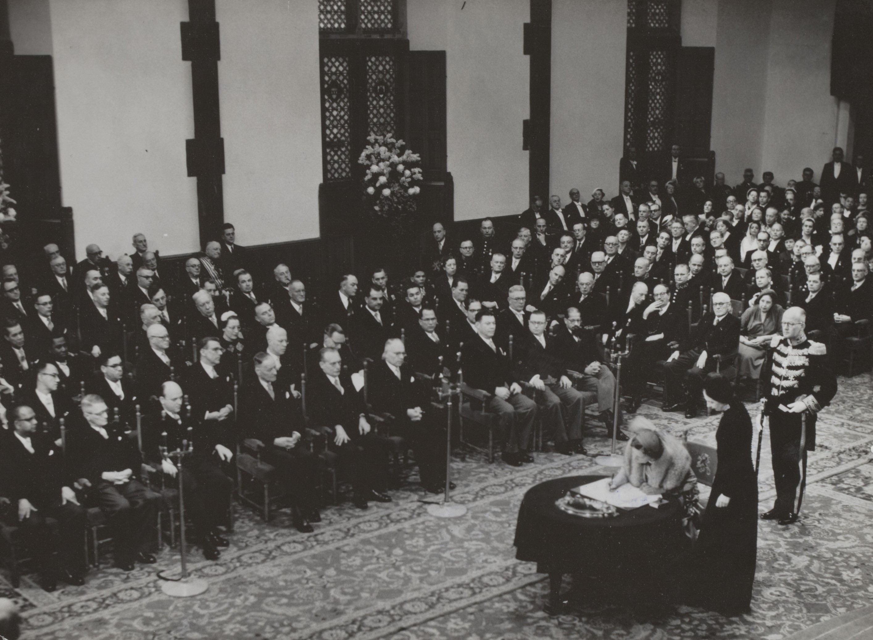 Collectie / Archief : Fotocollectie Elsevier Reportage / Serie : [ onbekend ] Beschrijving : Ondertekening van het Statuut van het Koninkrijk door koningin Juliana in de Ridderzaal te Den Haag Datum : 15 december 1954 Locatie : Den Haag, Zuid-Holland Trefwoorden : documenten, koninginnen, koninklijk huis, statuten, wetgeving Persoonsnaam : Juliana, koningin Fotograaf : Fotograaf Onbekend / Anefo Auteursrechthebbende : Nationaal Archief Materiaalsoort : Foto (zwart/wit) Nummer archiefinventaris : bekijk toegang 2.24.05.02 Bestanddeelnummer : 015-0005